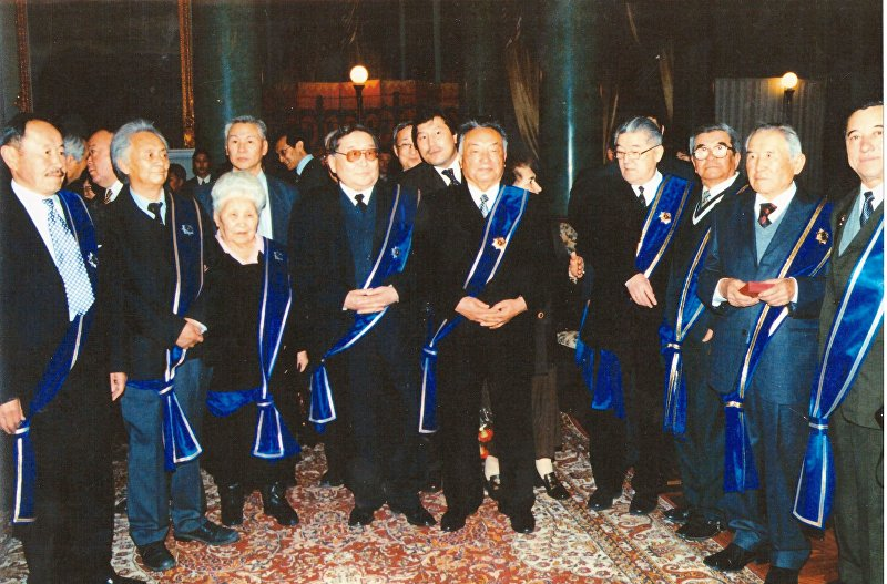 Фото академиков НАН КР в том числе и Какши Рыскулова